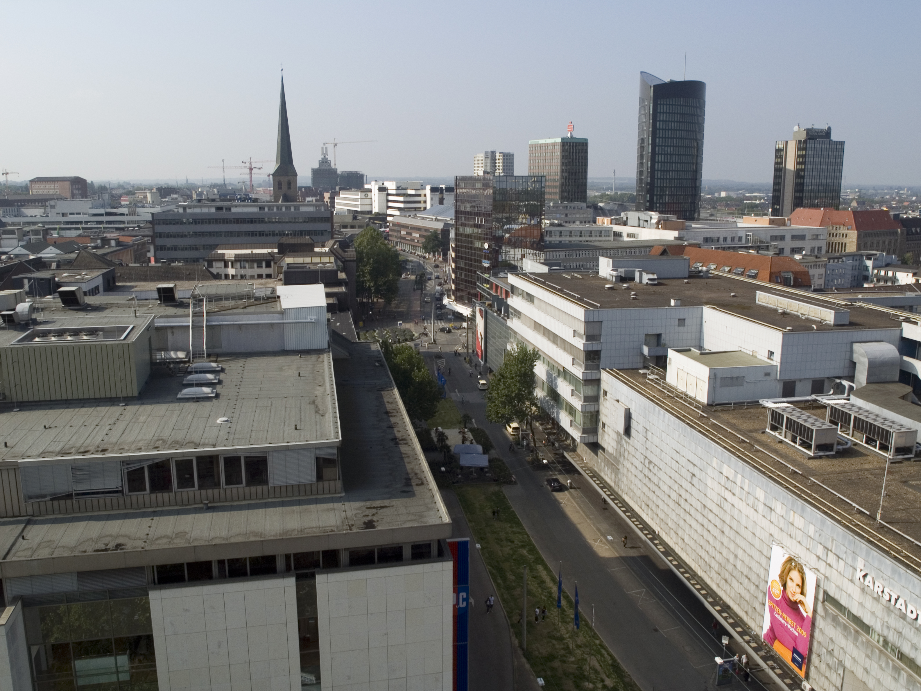 Blick auf Dortmund aus dem Glockenturm von St. Reinoldi